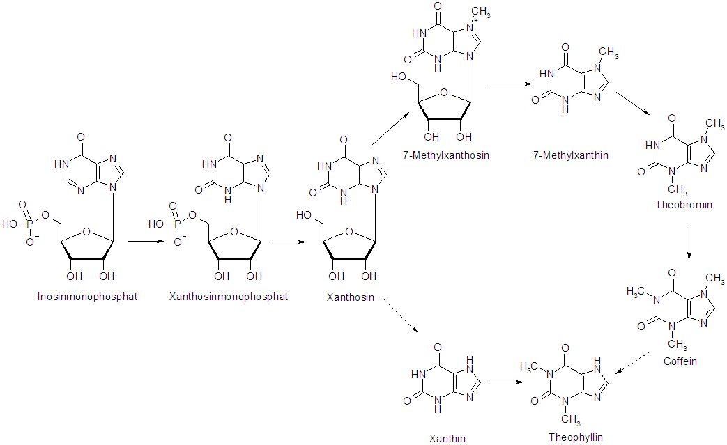 Biosynthese der Purinalkaloide nach P.M. Dewick (2009). Medicinal Natural Products. John Wiley Verlag, ISBN 0470741678